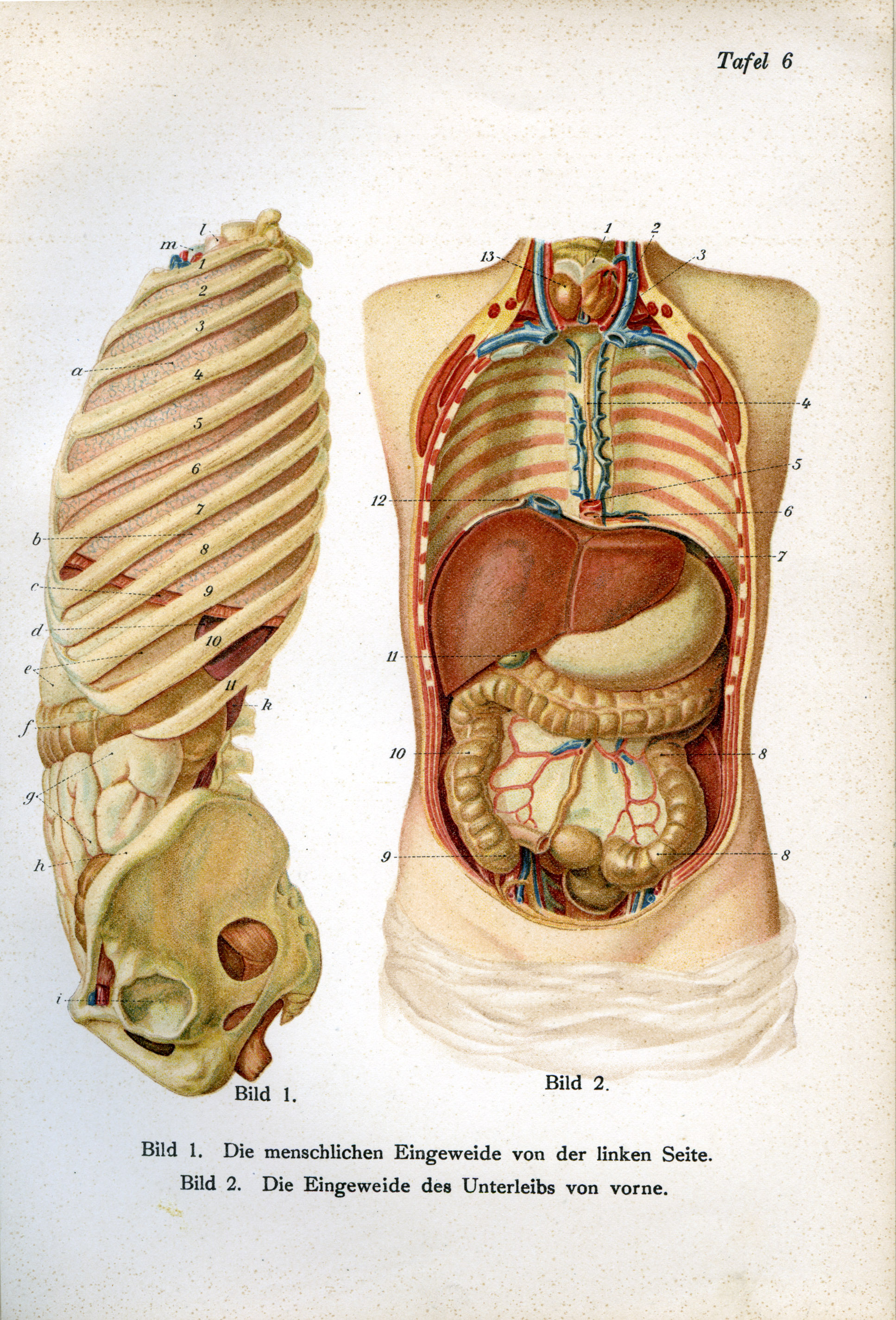 Illustration aus dem Buch: Der ärztliche Ratgeber in Wort und Bild. Unter Mitwirkung hervorragender Fachmänner herausgegeben von Dr. Fr. Siebert, J. F. Lehmanns Verlag, München.